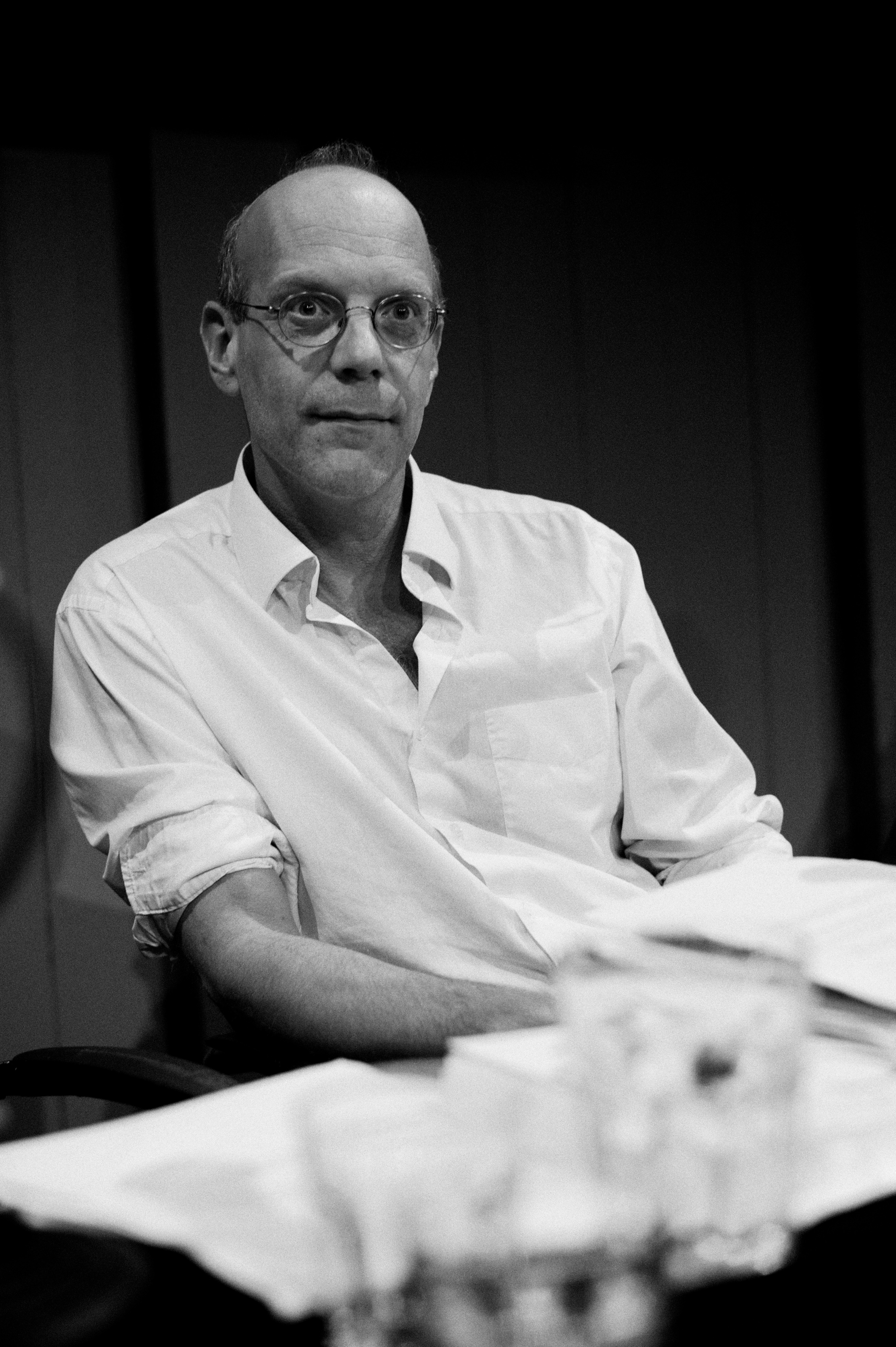 20101116 DDP Geert_Lovink